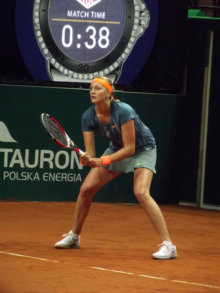 Zdjęcie zrobione podczas kobiecego turnieju tenisowego BNP Paribas Katowice Open, w katowickim Spodku.